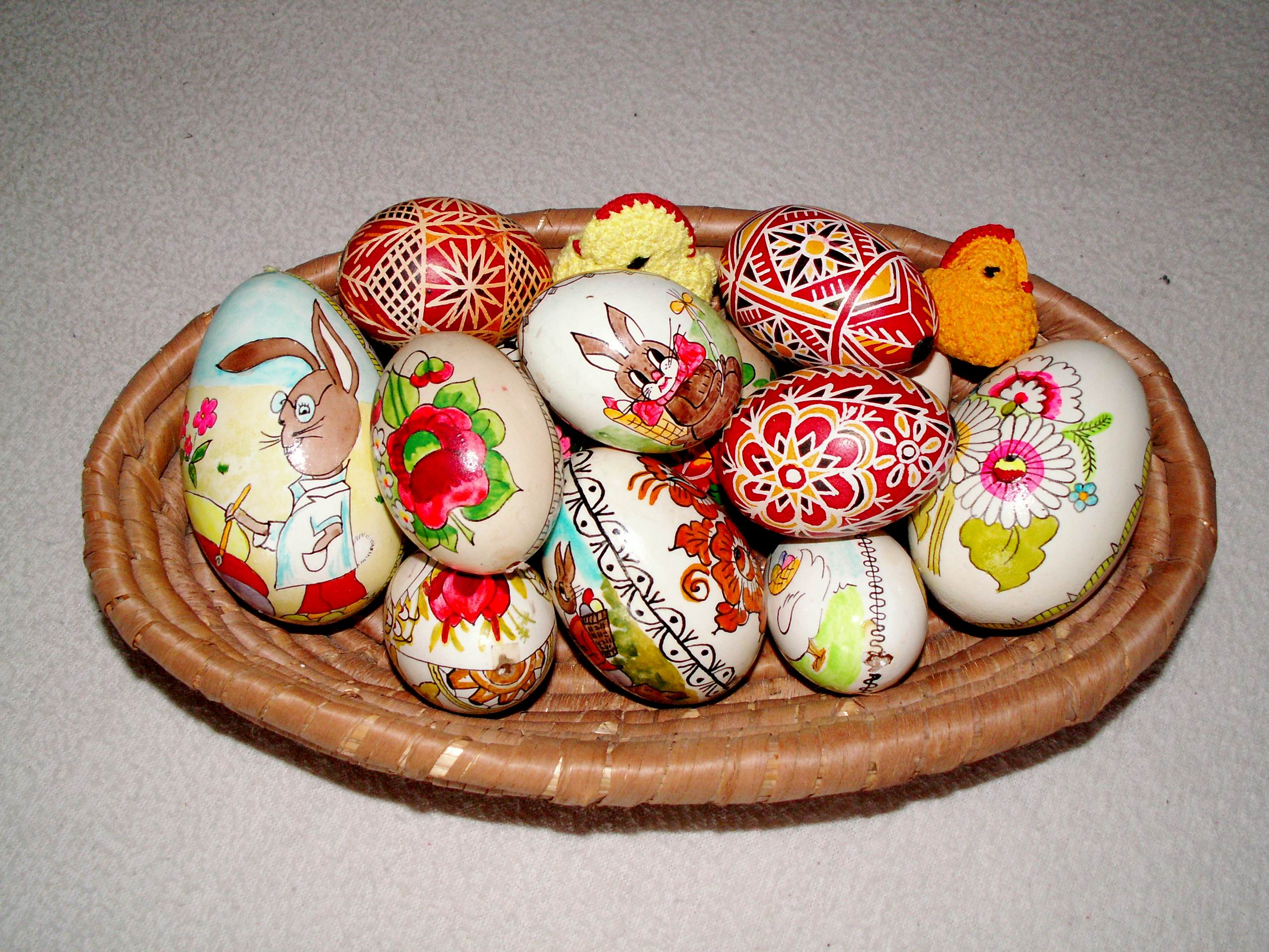 Easter eggs